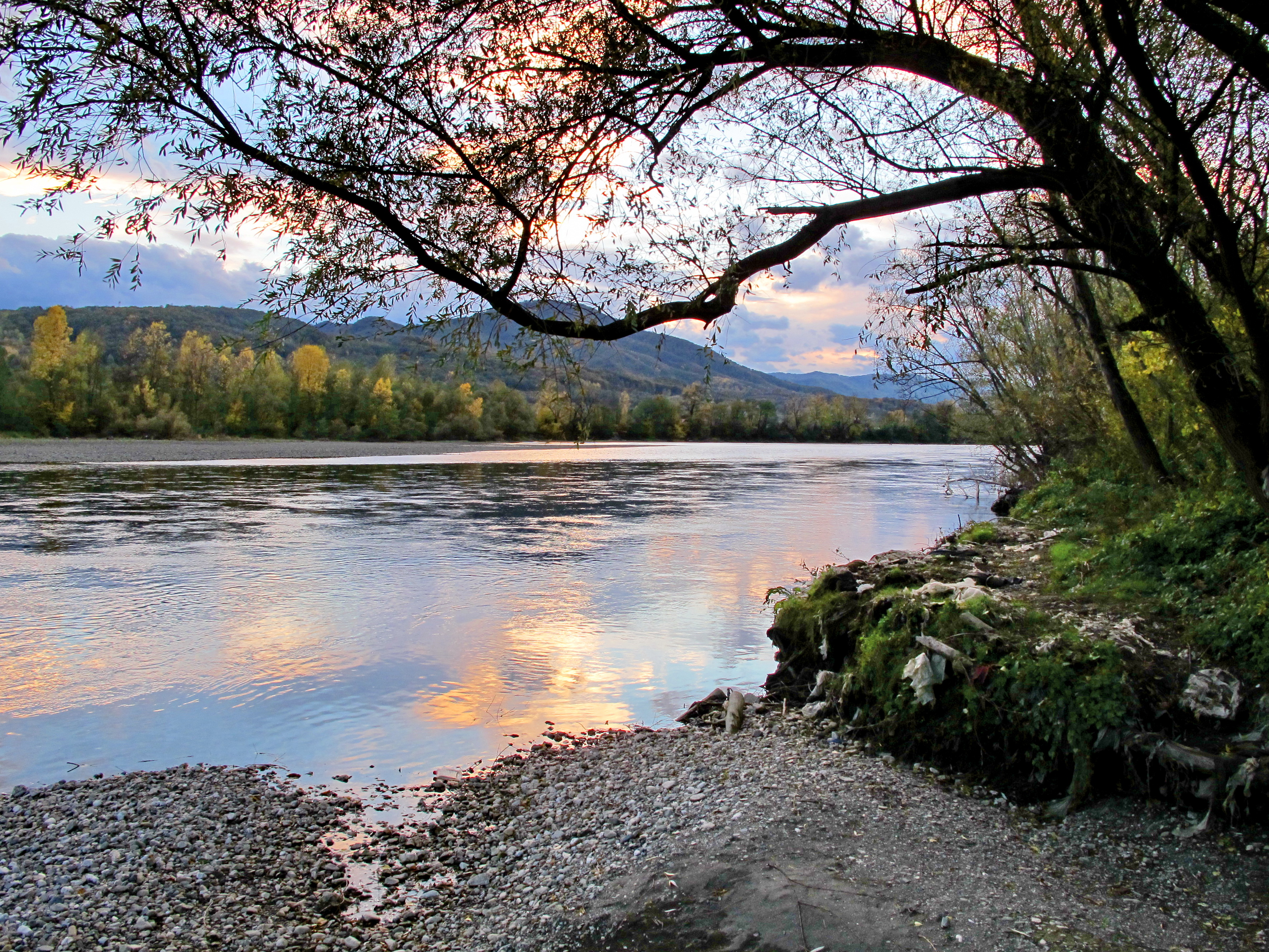 Ljubovija